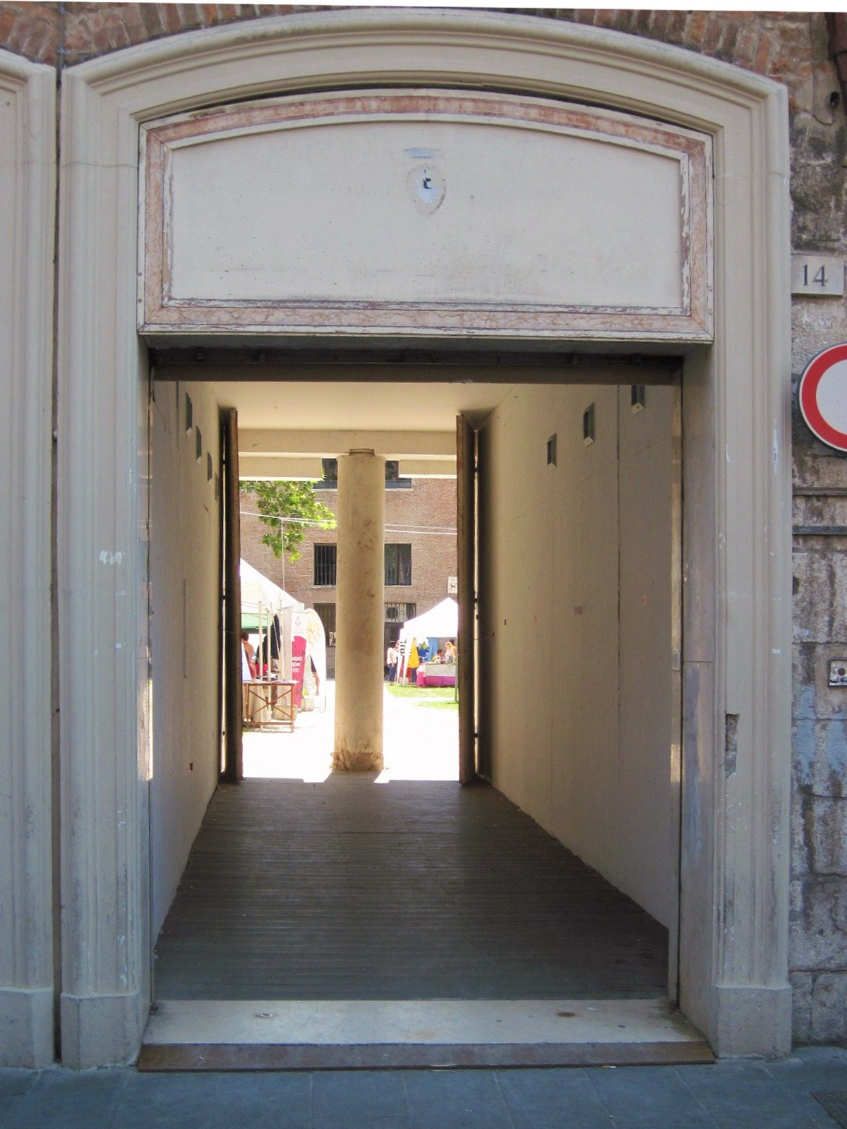 Giardino delle Duchesse, Ferrara. Edifici e accesso nord, da piazzetta Castello